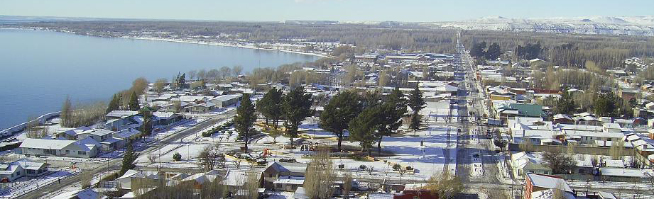 Ciudad de Chile Chico época de Invierno